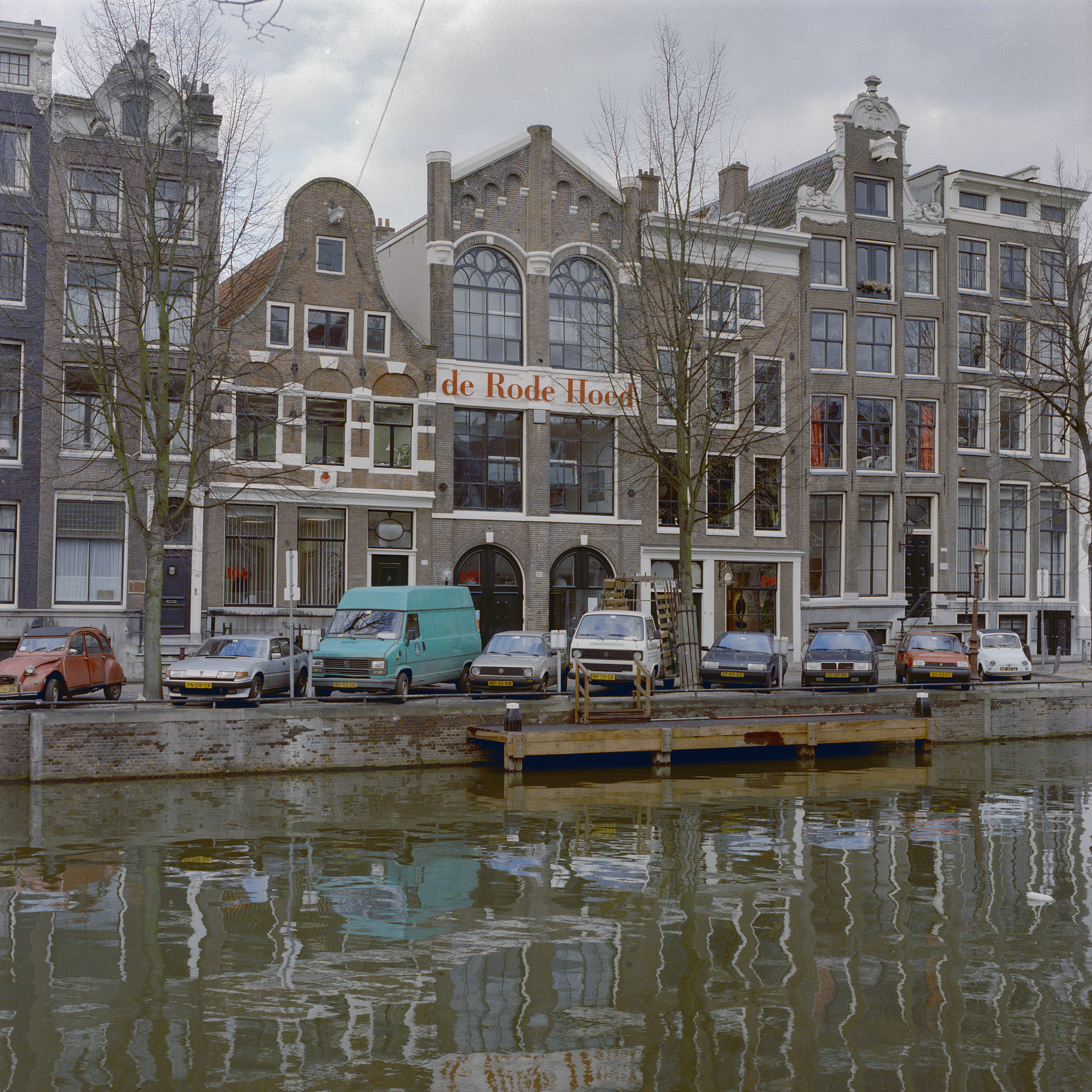 "DE RODE HOED": Exterieur OVERZICHT VOORGEVELS This is an image of rijksmonument number 2482